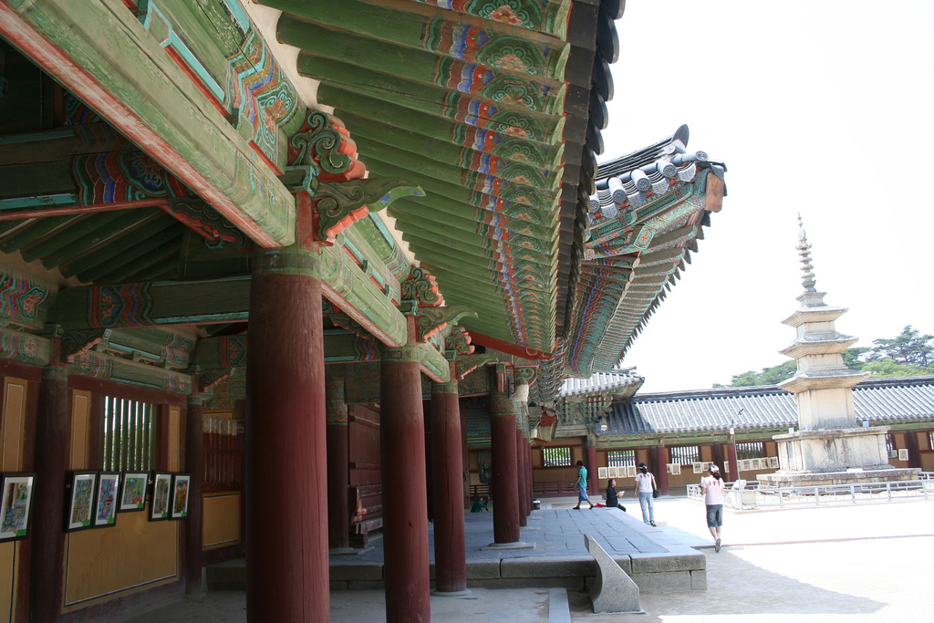 Bulguksa, Gyeongju, Gyeongsangnam-do, South Korea